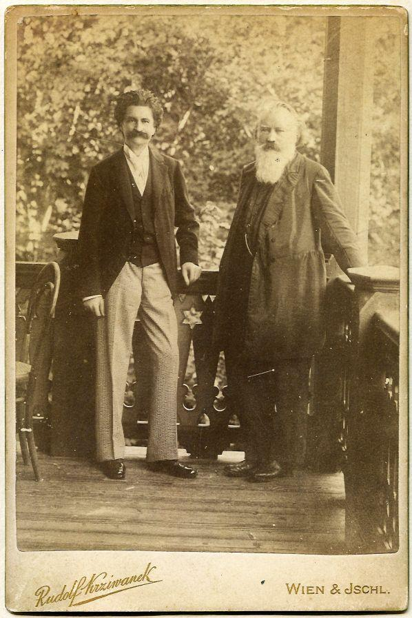 Johann Strauß (Sohn) und Johannes Brahms am Balkon von Strauß' Villa in Bad Ischl, 1894, Porträtphotographie von Rudolf Krziwanek, Wien & Ischl